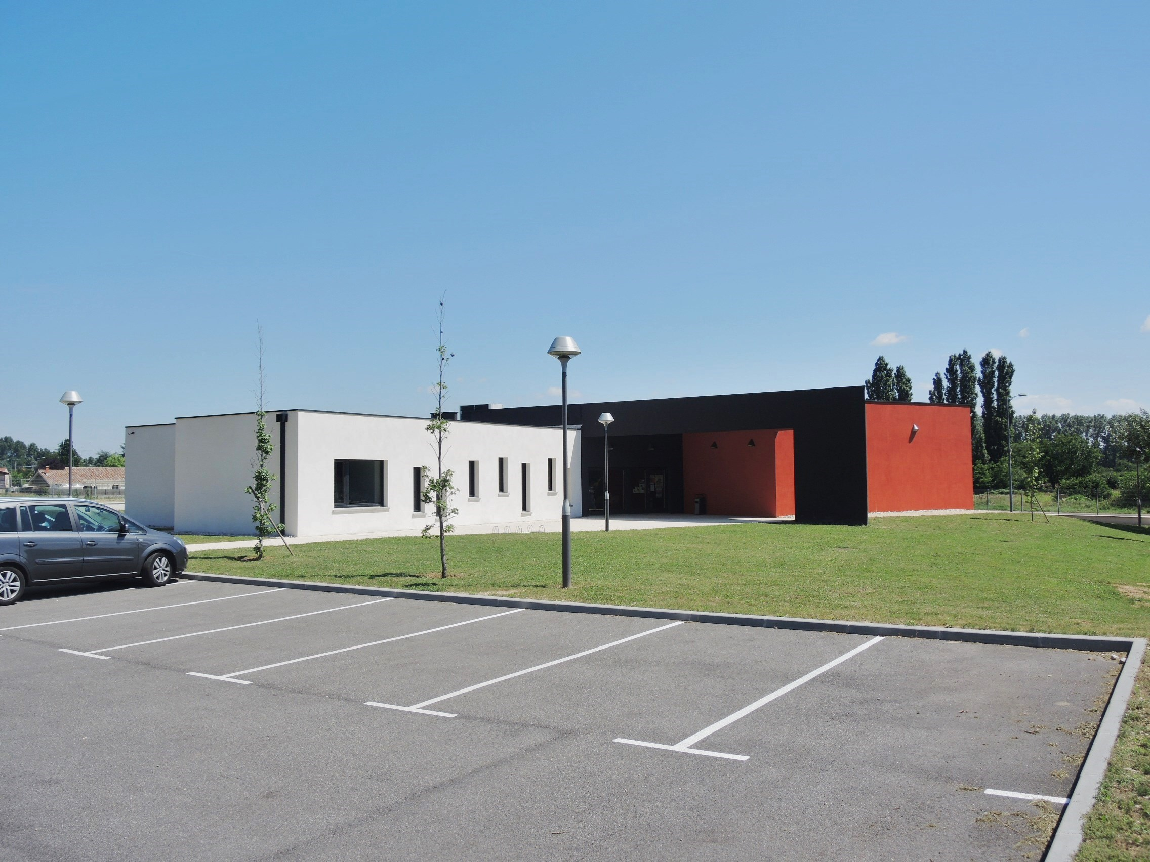 Limony détail